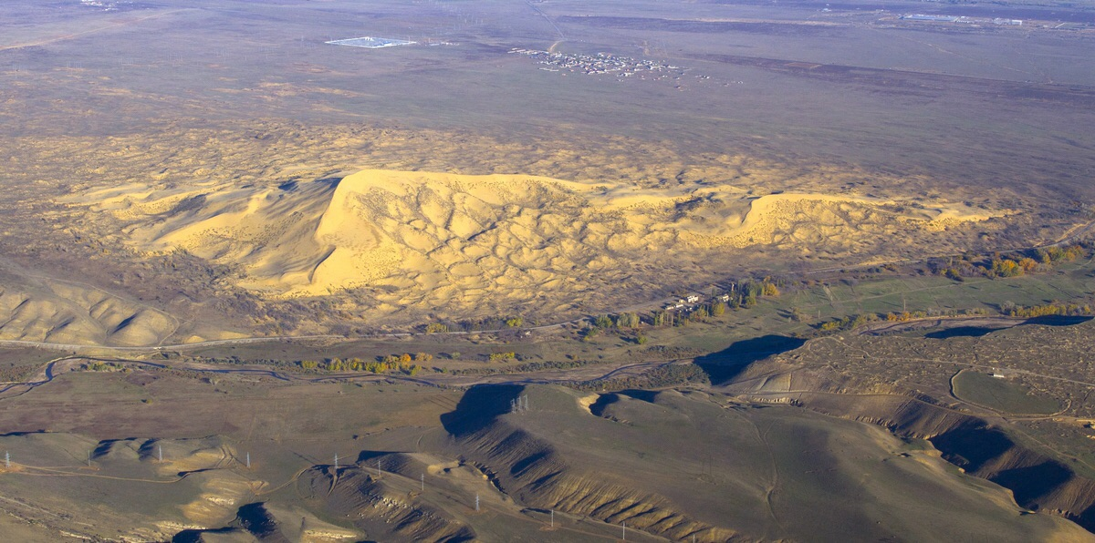 Бархан 'Сары-Кум', Кумторкалинский район This image is related to the protected area of Russia number 0510023